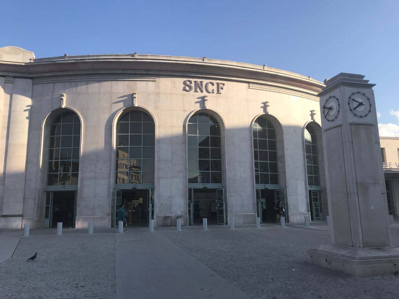 Façade de la gare de Versailles-Chantiers, avec le nouveau parvis sans circulation automobile.